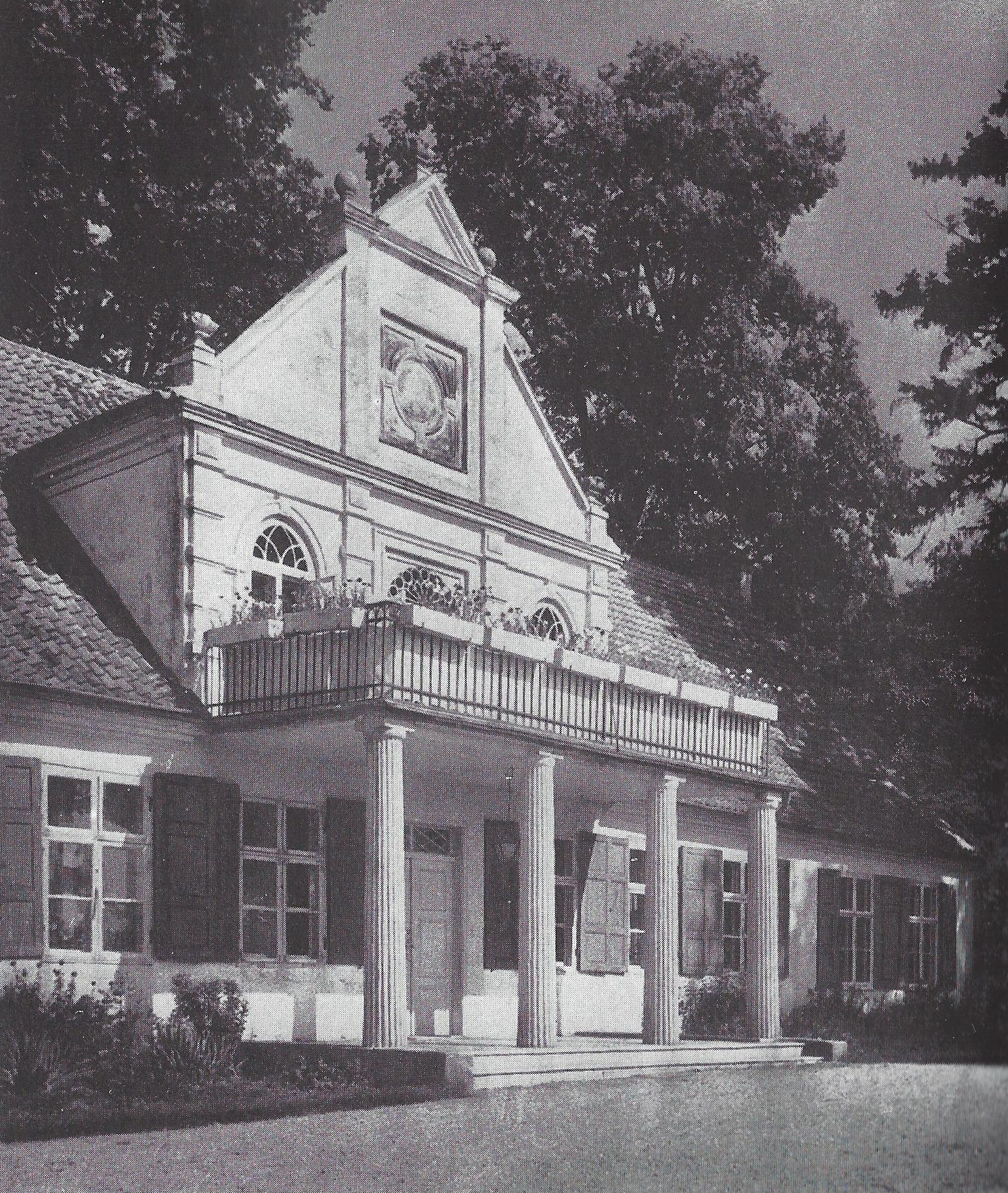 Gutshaus in Lapsau